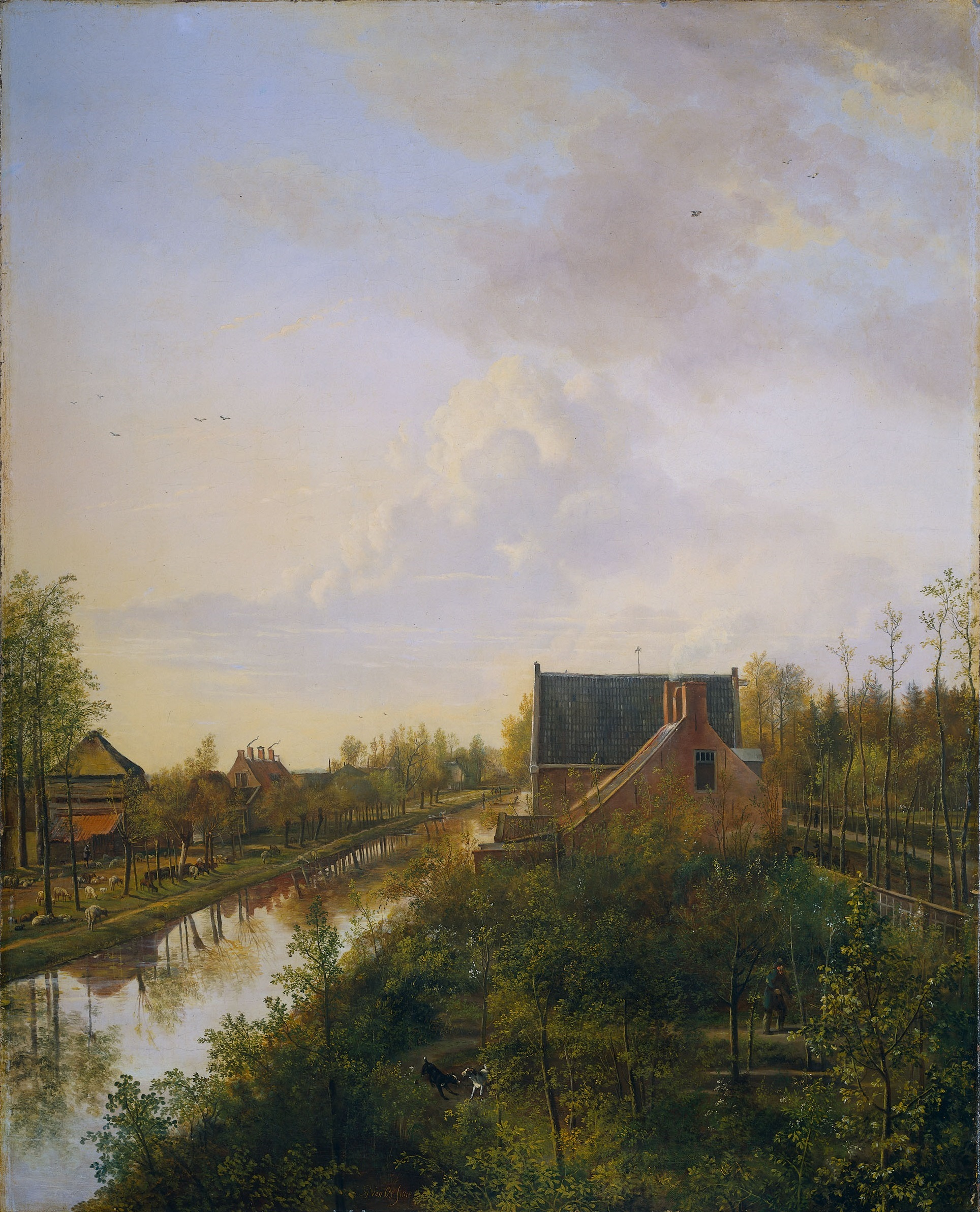 pendant of File:Pieter Gerardus van Os 001.jpg